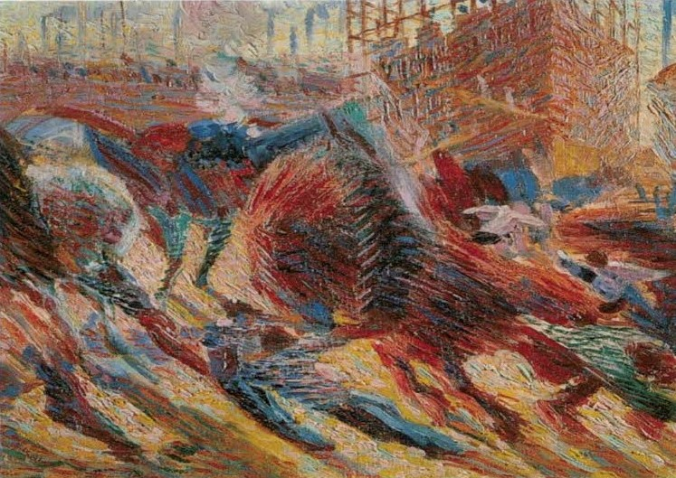 Umberto Boccioni, La città che sale (bozzetto) 1910